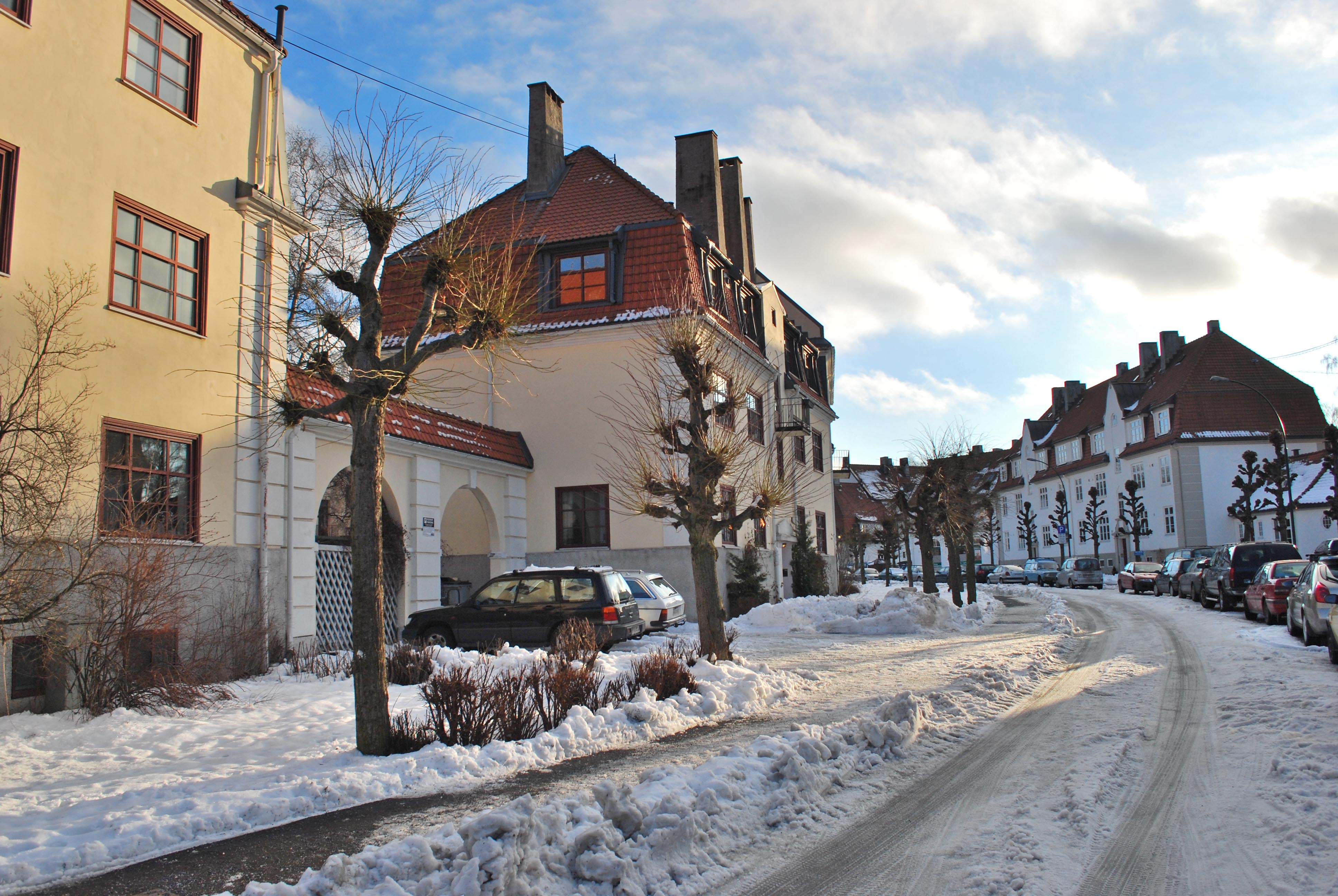 Kommunale boliger i Fayes gate, Lindern, buet gate